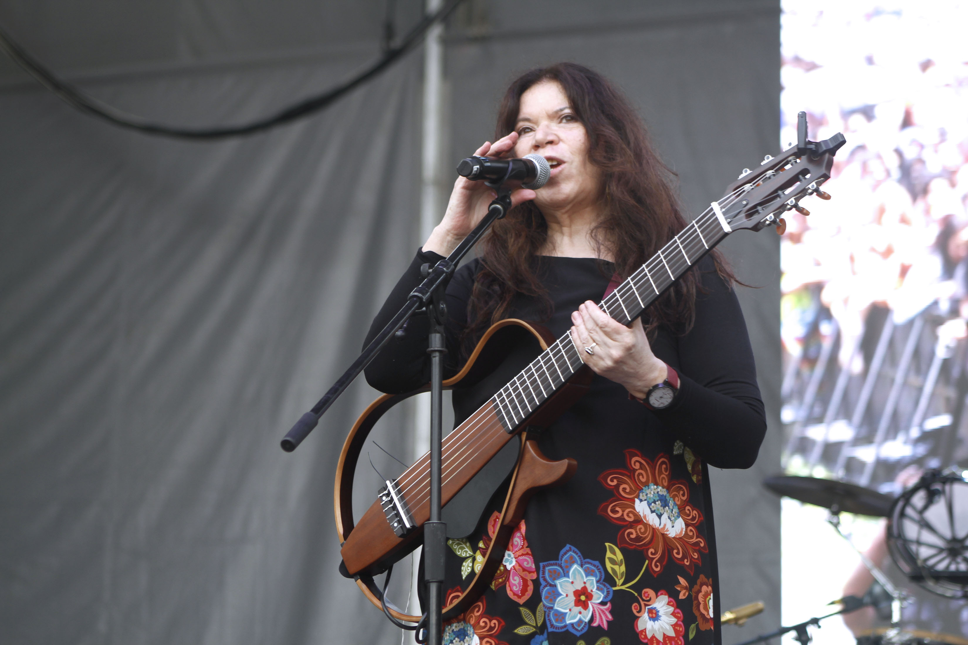 Sábado 27 de julio de 2019. Como parte de las actividades del festival Cantares, Fiesta de Trova y Canción Urbana, en Ciudad Universitaria, CU, se presentaron Isabel y Tita Parra con Inti Illimani. Fotografía: Maritza Ríos / Secretaría de Cultura de la Ciudad de México.